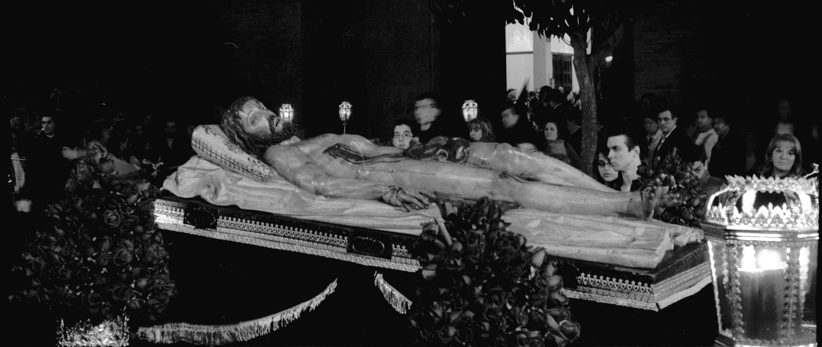 Entrada a hombros en la Iglesia Parroquial de San Pío X (barrio Girón) de la talla de Cristo Yacente de Gregorio Fernández. Portada por la Cofradía del Santo Entierro en Jueves Santo, durante la procesión del Santo Entierro. Tomada con cámara Canon AT-1, B/N, positivada con escáner hp scanjet 3970, recortada y filtrada con Photoshop